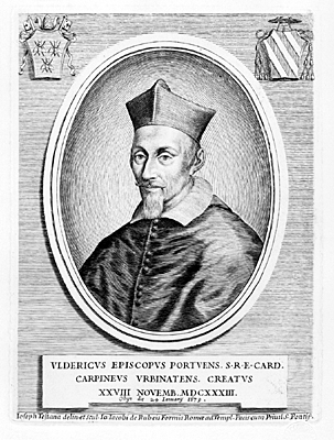 Ulderico Cardinal Carpegna (1595-1679)Incisione. mm.144x196 Roma, Italia, Palazzo Braschi.